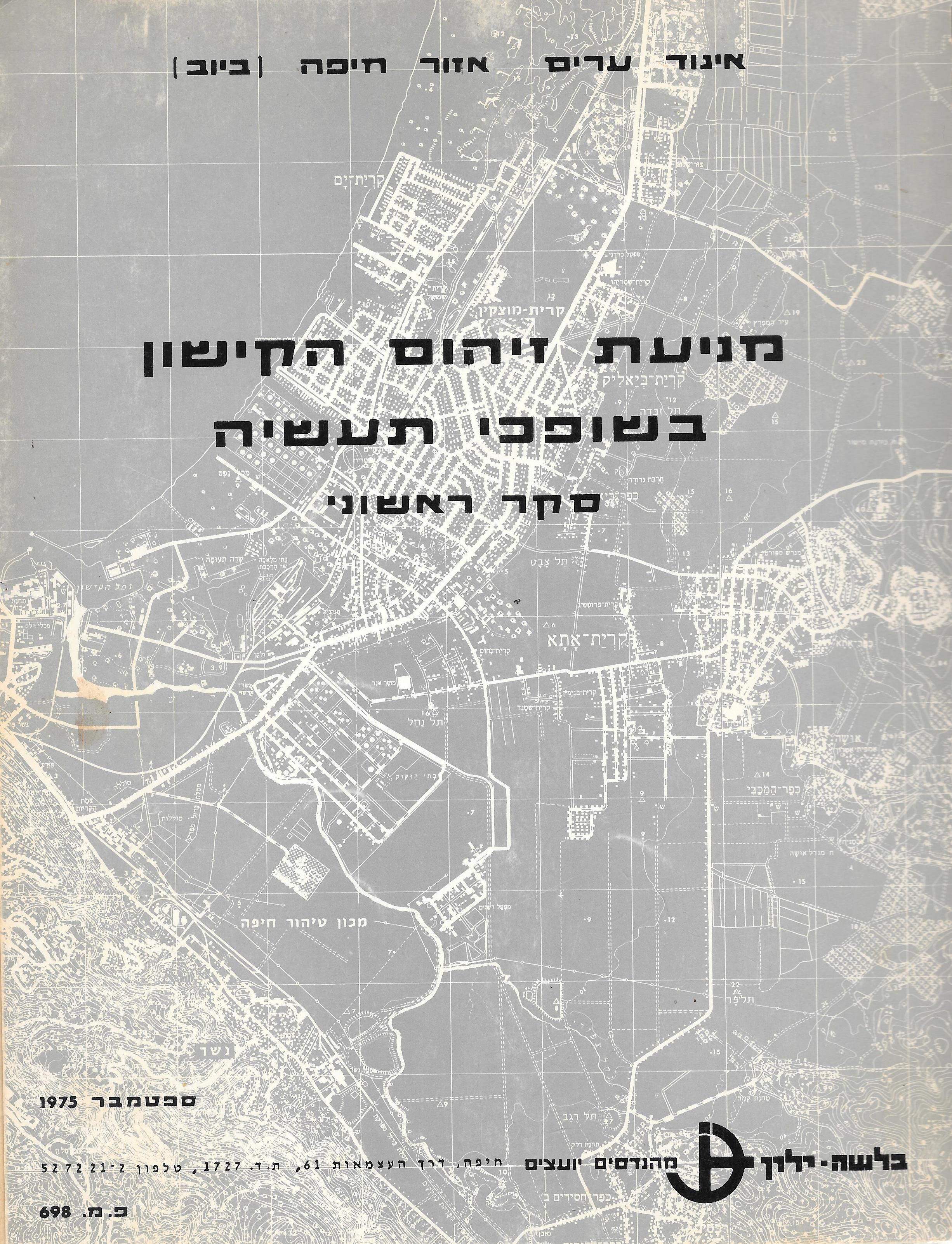 מניעת זיהום הקישון בשפכי תעשיה סקר ראשוני